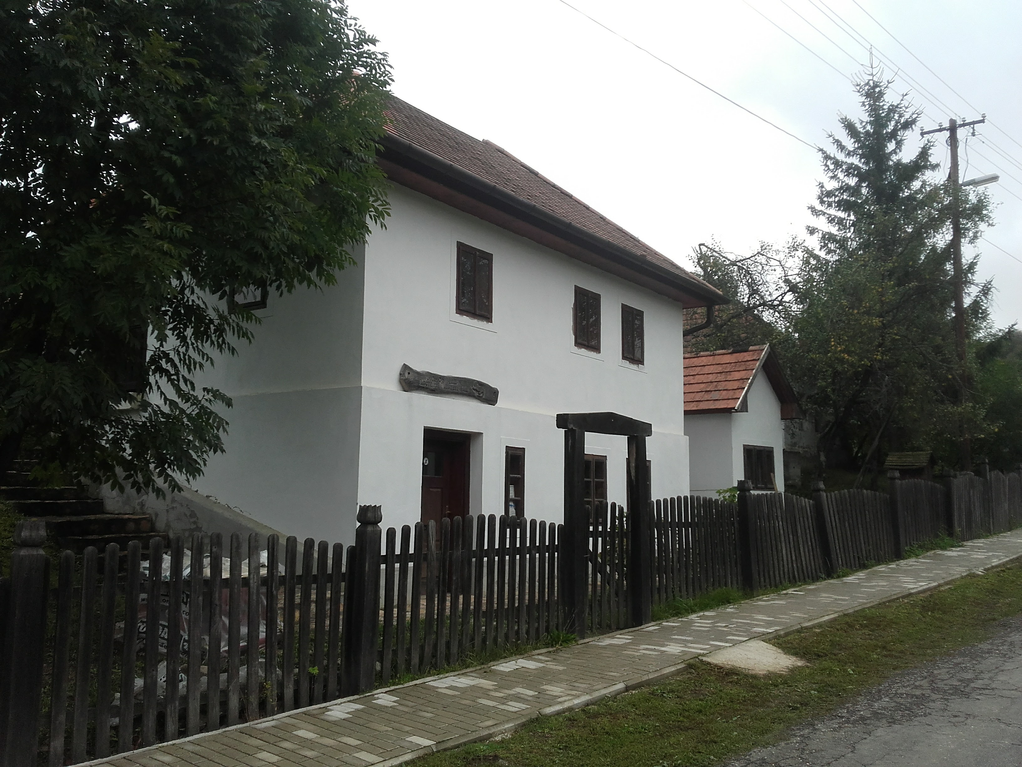 Az Aggteleki Nemzeti Park "Mohos-háza" Keleméren, műemlék népi lakóház This is a photo of a monument in Hungary, Identifier: 2845